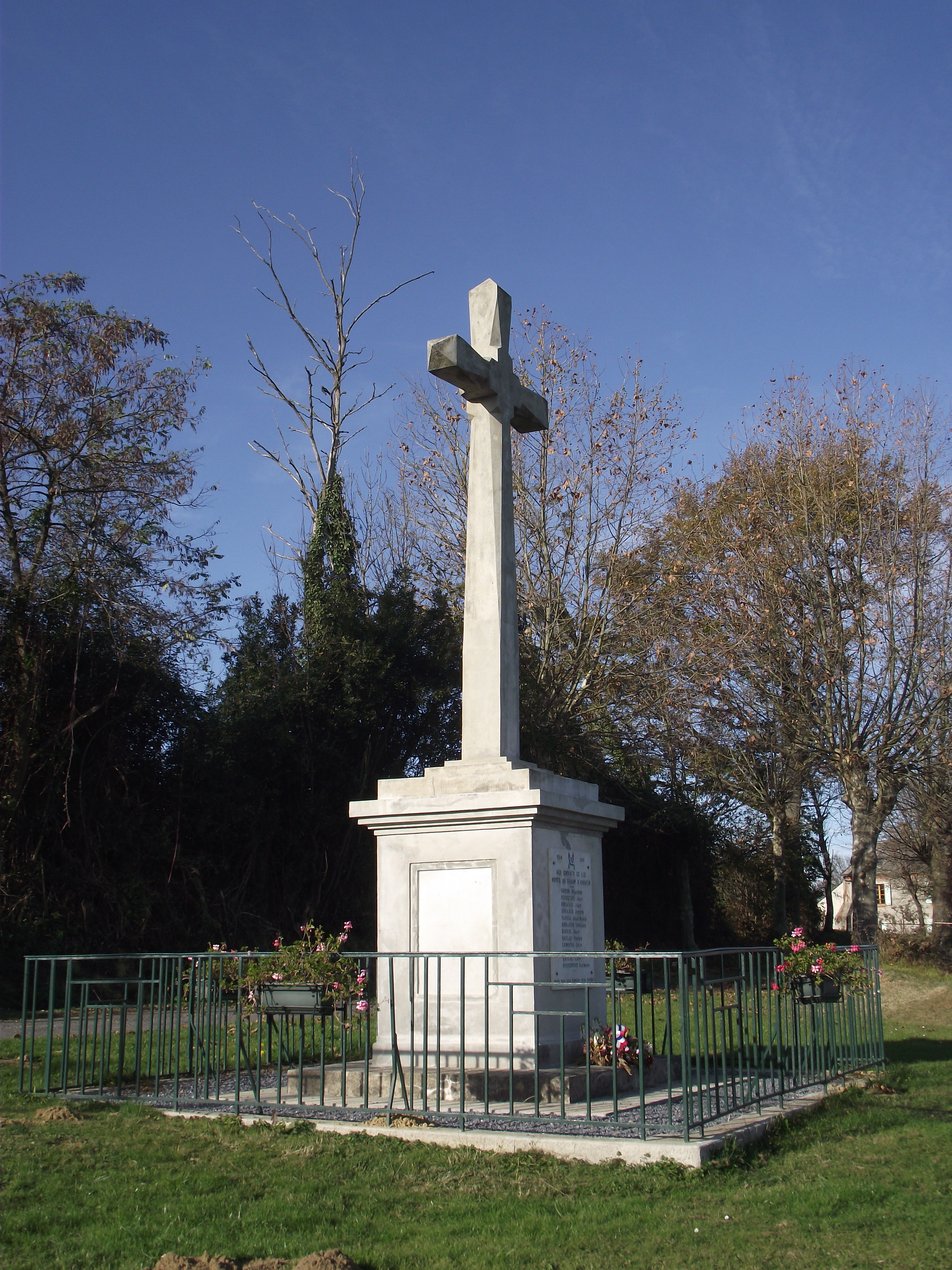 Monument aux morts de Luc (Hautes-Pyrénées, France)